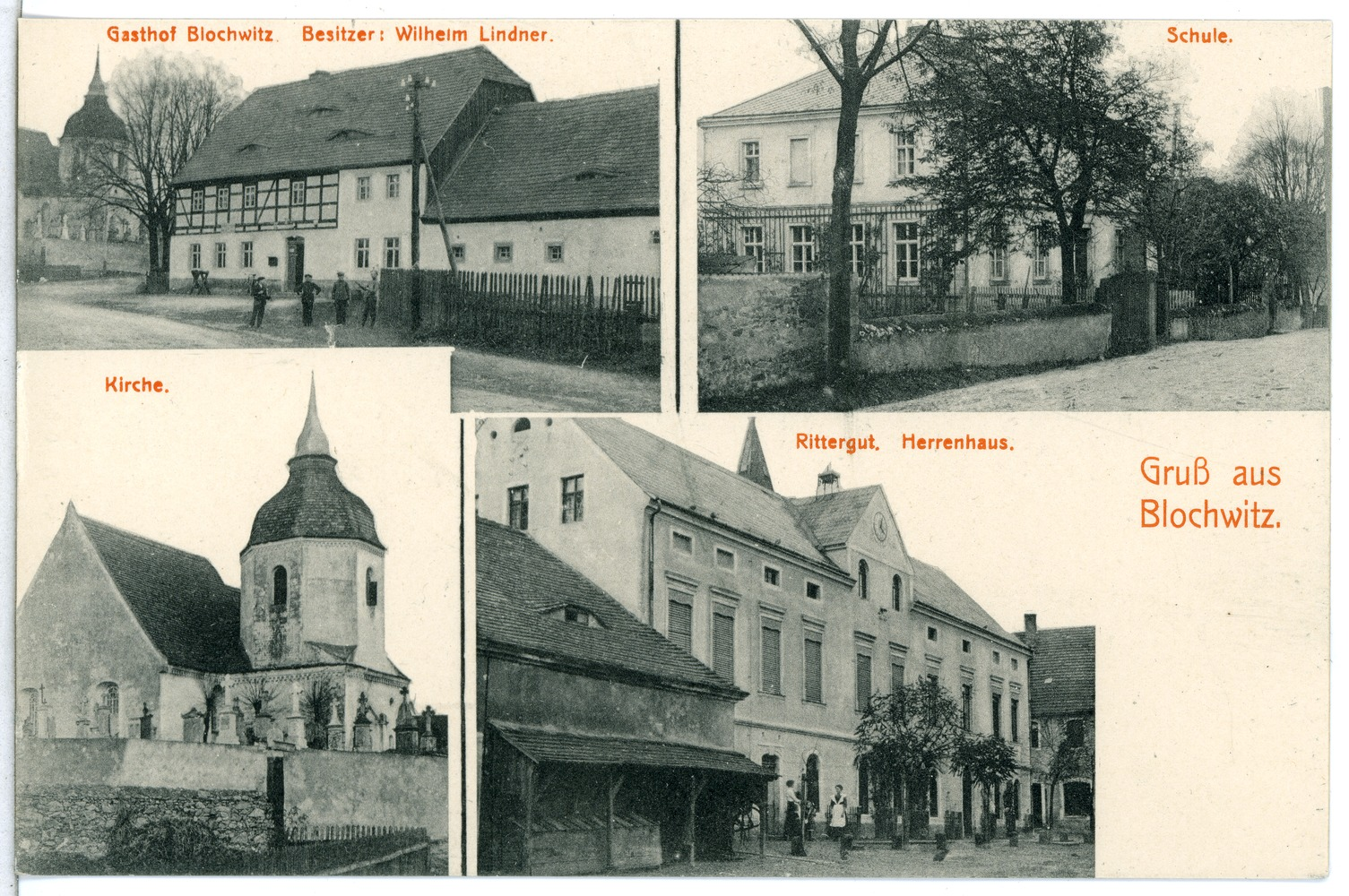 Blochwitz; verschiedene Ortsansichten This postcard is from publisher Brück & Sohn in Meißen ( postcard has a unique number 15300 and is available in a higher resolution at the publisher. This images was uploaded in a cooperation project between Wikipedians and the publisher.